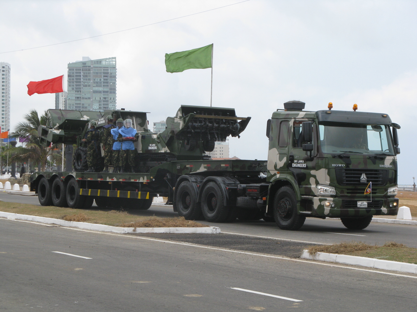 Demining Unit - Sri Lanka Army